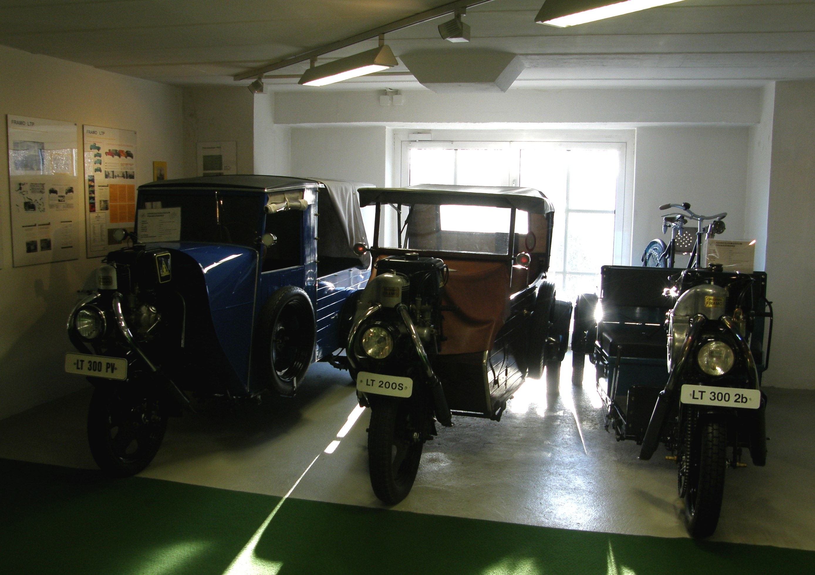 Framos der Typen LT300PV+LT200S+LT3002b